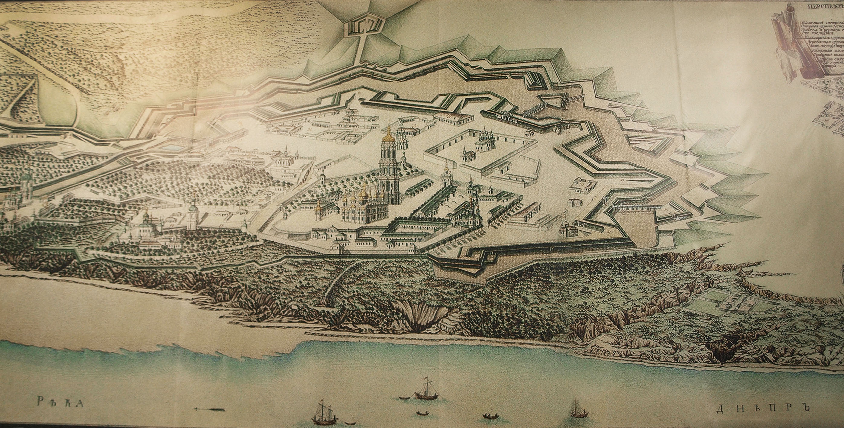 «Перспект Києво-Печерської фортеці і частини форштата з Московської сторони», 1783